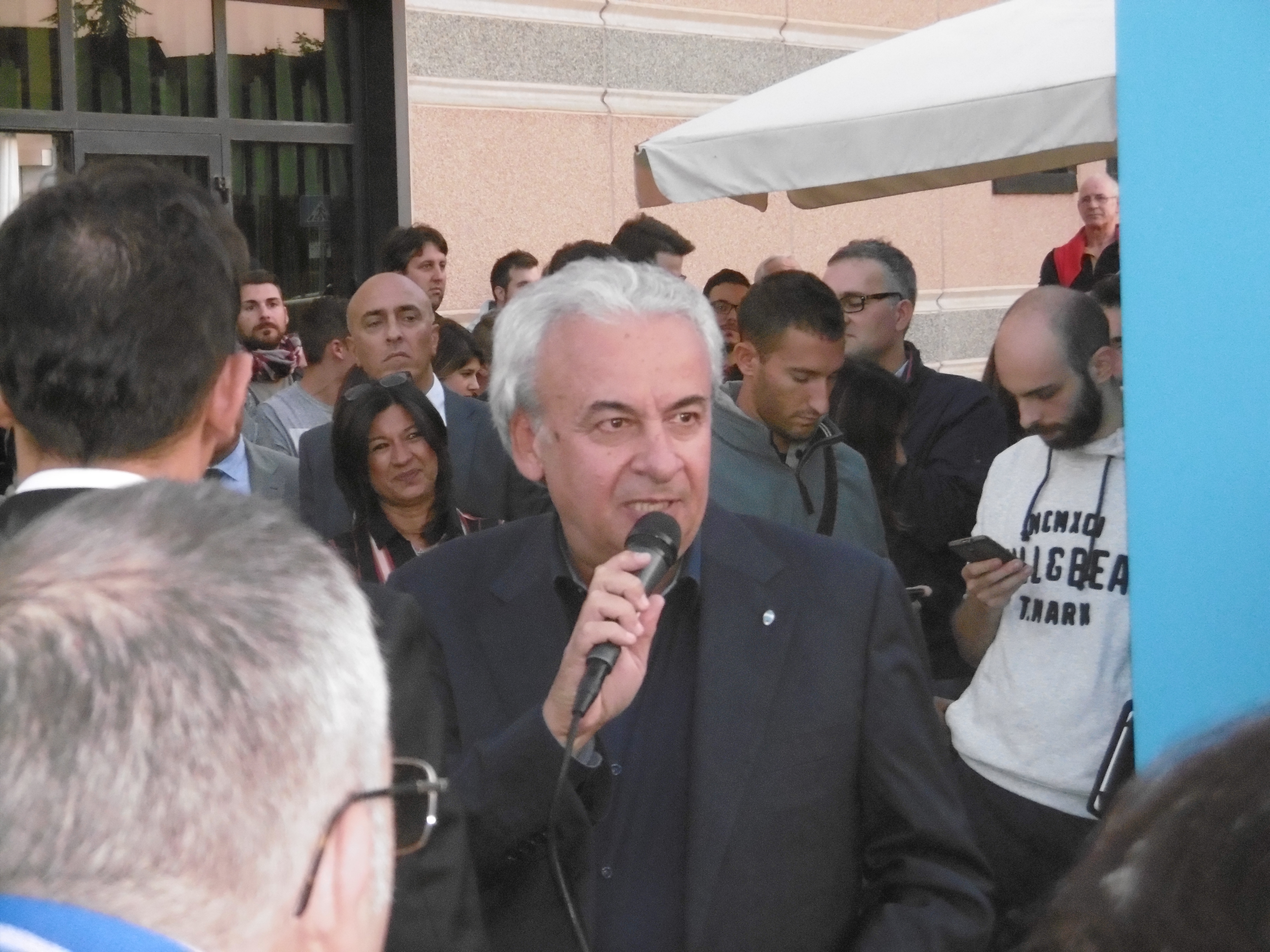 Walter Mattioli all'inaugurazione del nuovo Temporary Store SPAL a Ferrara presso l'ex edicola del Centro Commerciale “Il Castell